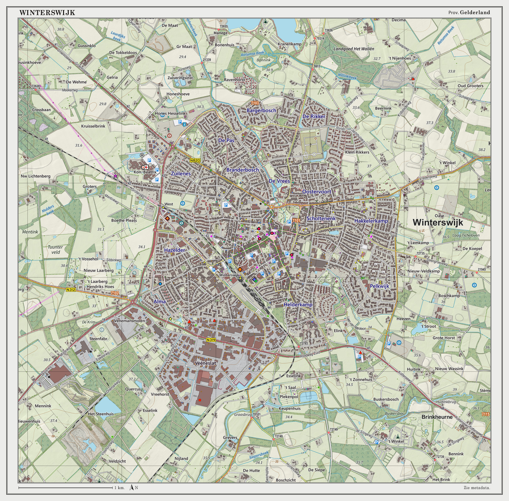 Topografische kaart van Winterswijk (woonplaats). Resolutie: 300 pixels/km. Kaartbeeld samengesteld uit de open geodata van de Top10NL en Top25namen (Basisregistratie Topografie, Kadaster), Creative Commons BY licentie. Gebouwvlakken uit open geodata BAG extract. Wegen uit de OpenStreetMap. Reliëfschaduw uit de Actuele Hoogtekaart AHN2. Samenstelling en kleurenschema: Jan-Willem van Aalst, met QGIS2. Zie ook de Legenda.